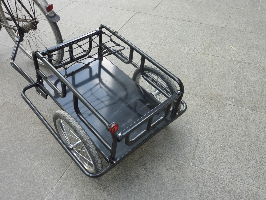 Zweirädriger, schwarz lackierter Fahrrad-Lastenanhänger mit Stahlrohr-Rahmen und -Reling und Stahlblech-Ladefläche sowie mit Tiefdeichsel und Rahmen-/Hinterradnaben-Kupplung